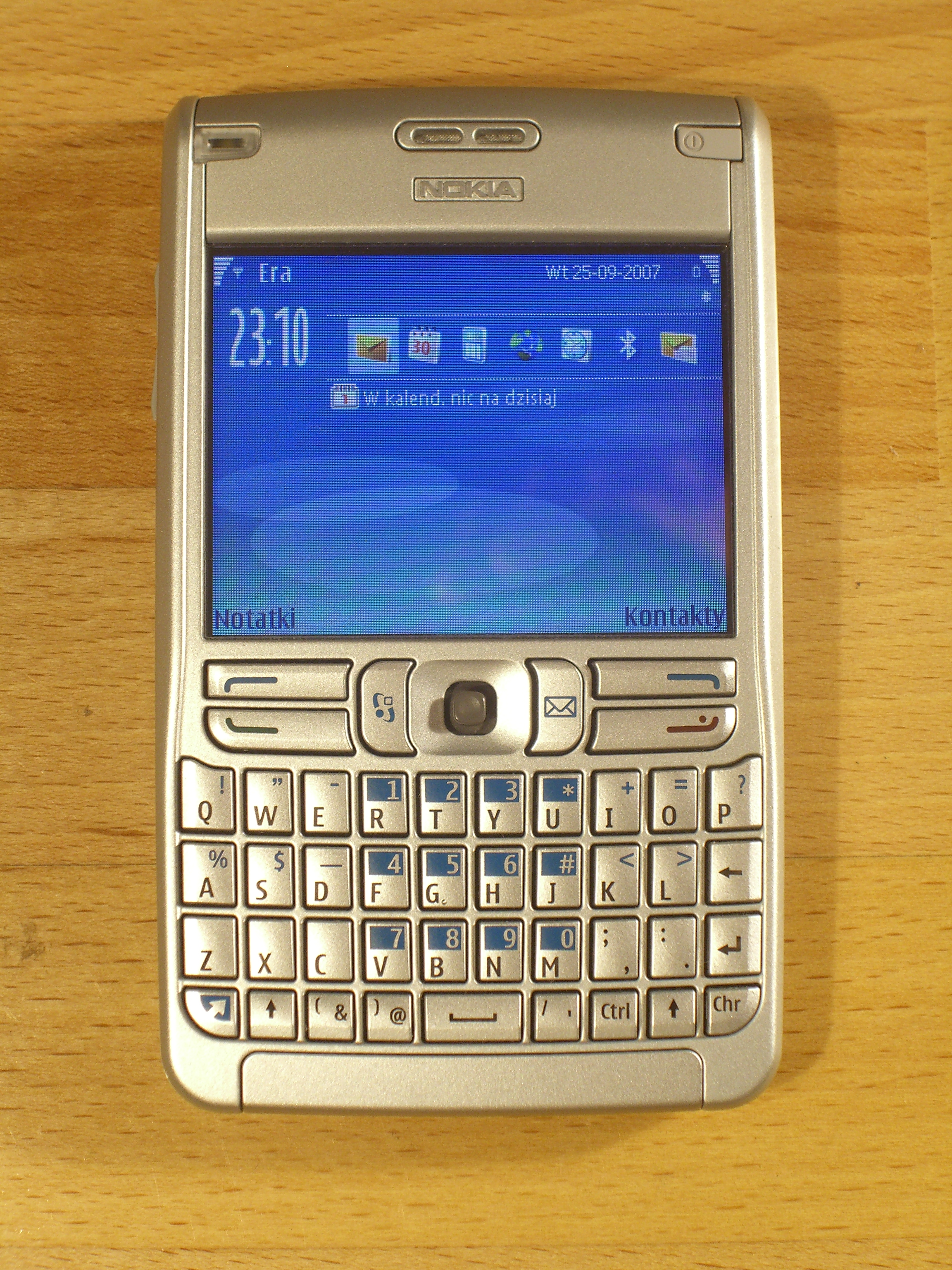 Nokia E61